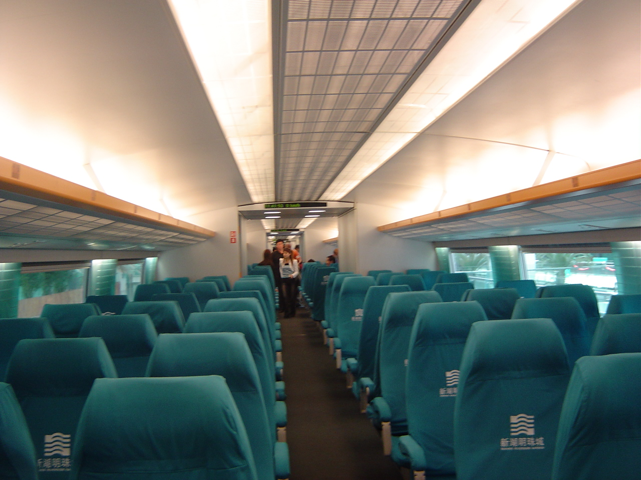 2006 上海 磁悬浮